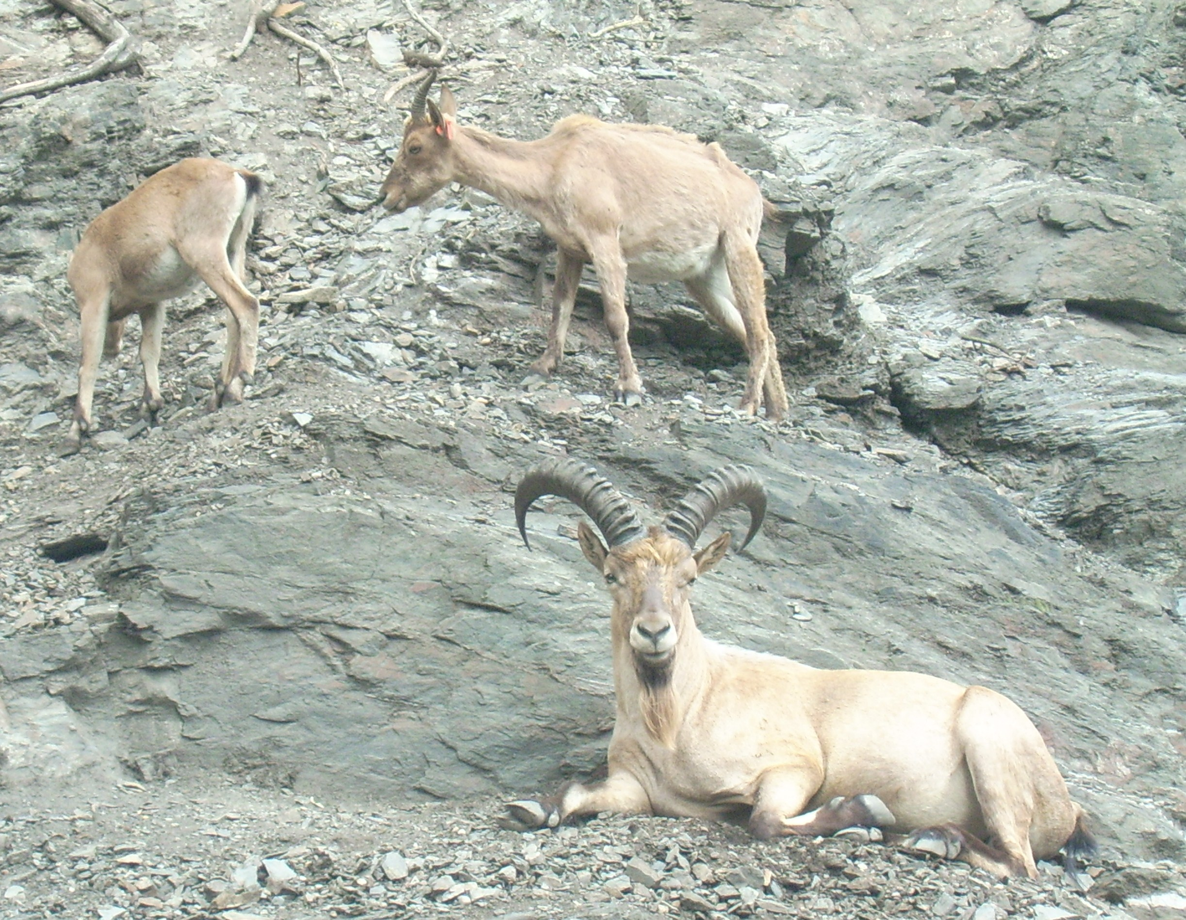 Capra caucasica at Zoo Praha